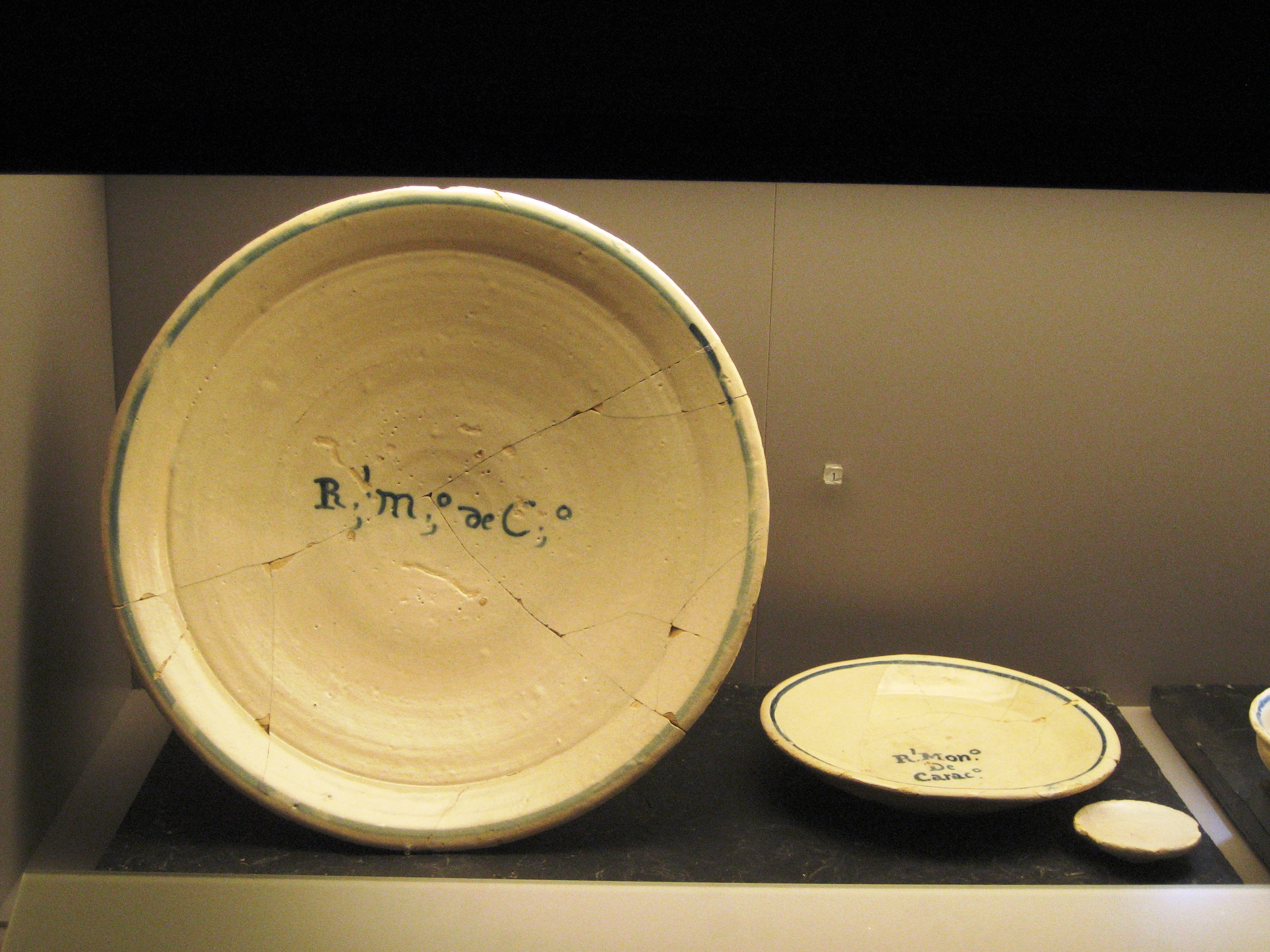 Vajilla del Monasterio de Santa María de Carracedo, en Carracedo del Monasterio, León, España